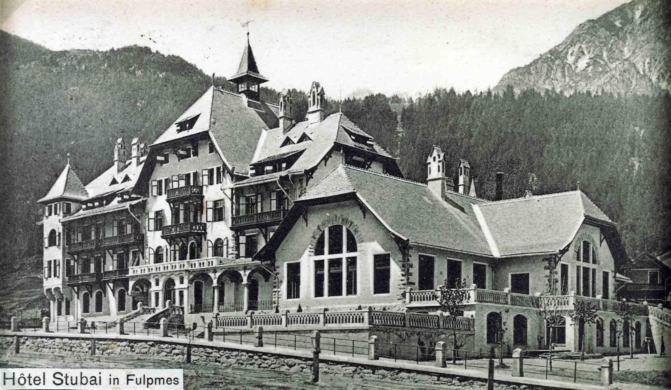 Granhotel Stubai, Fulpmes (Nordtirol), 1904